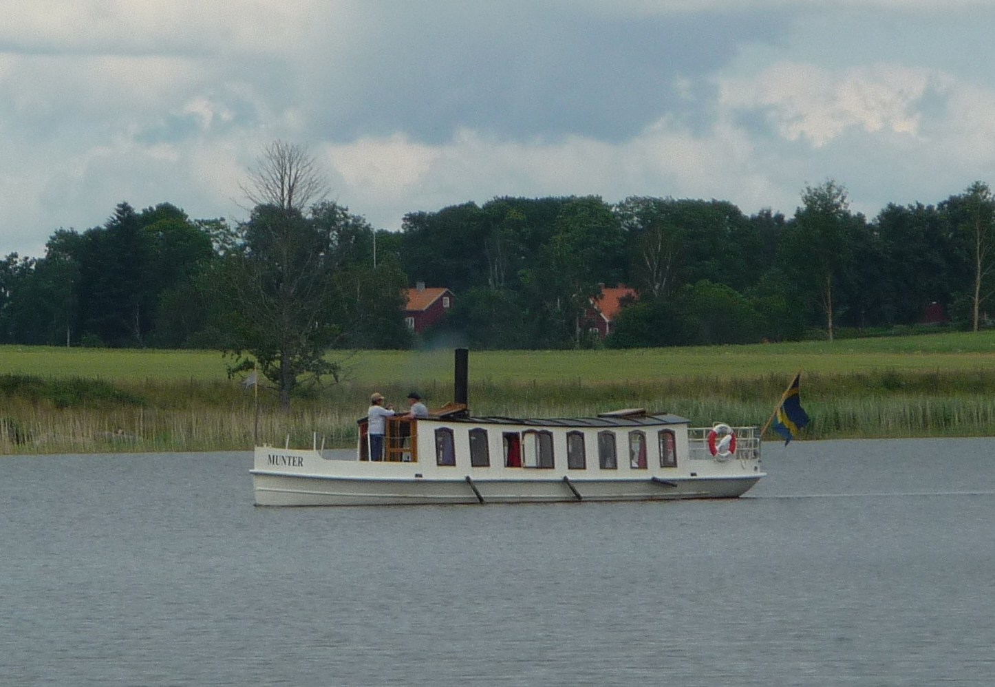 Ångbåten Munter, här på sjön Yngaren i Södermanland. This is an image of the protected Swedish ship Munter, with call sign SFC-9698 . [1]